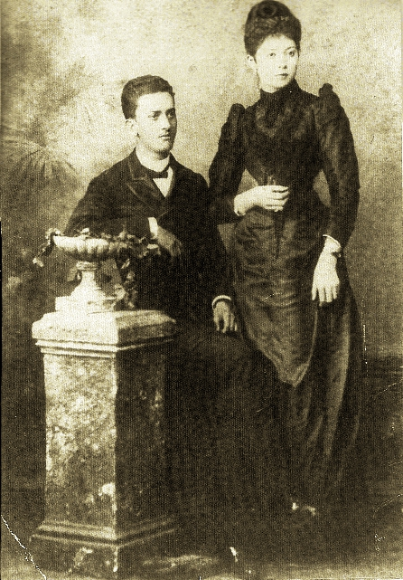 Aristides Cecilio de Assis Coimbra e a sua mulher, Elvira Augusta, filha dos Viscondes de Caldas